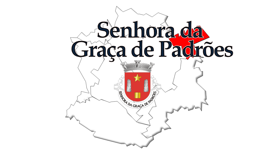 Evolução da População